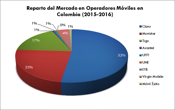 Información del mercado en operadores móviles en Colombia (2015-2016). Fuente del archivo e información del mercadeo CRC Colombia.